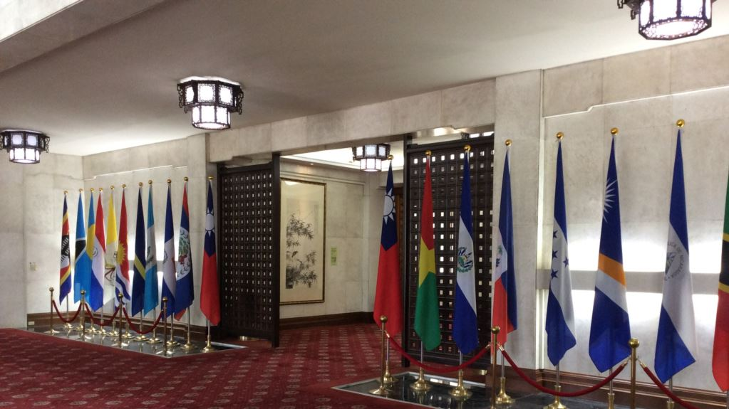 中文（中国大陆）: 台湾外交部大厅内的邦交国国旗 （美国之音记者申华 拍摄）